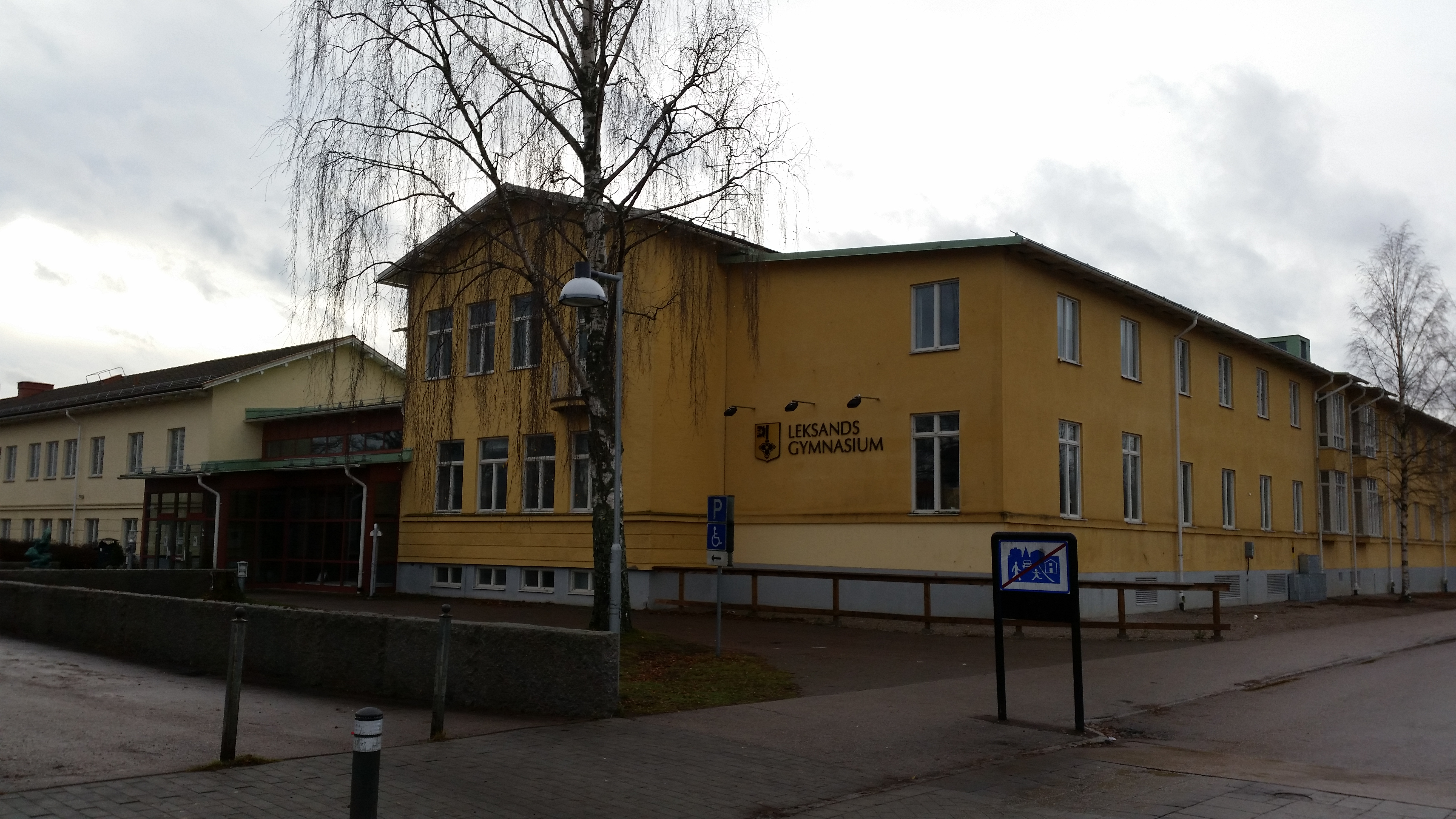 Gymnasieskolan i Leksand.